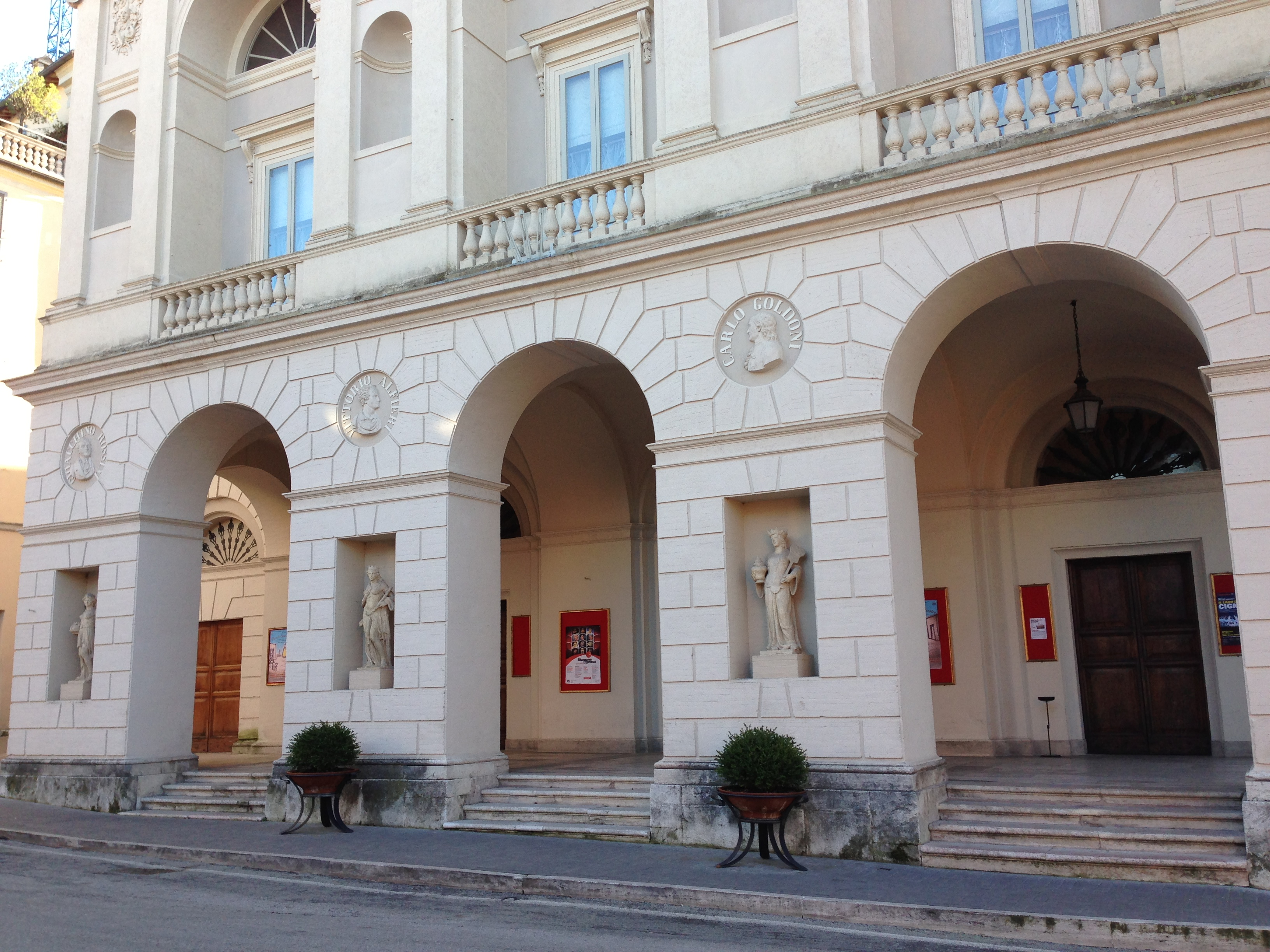 Ingresso del Teatro Nuovo "Gian Carlo Menotti" di Spoleto